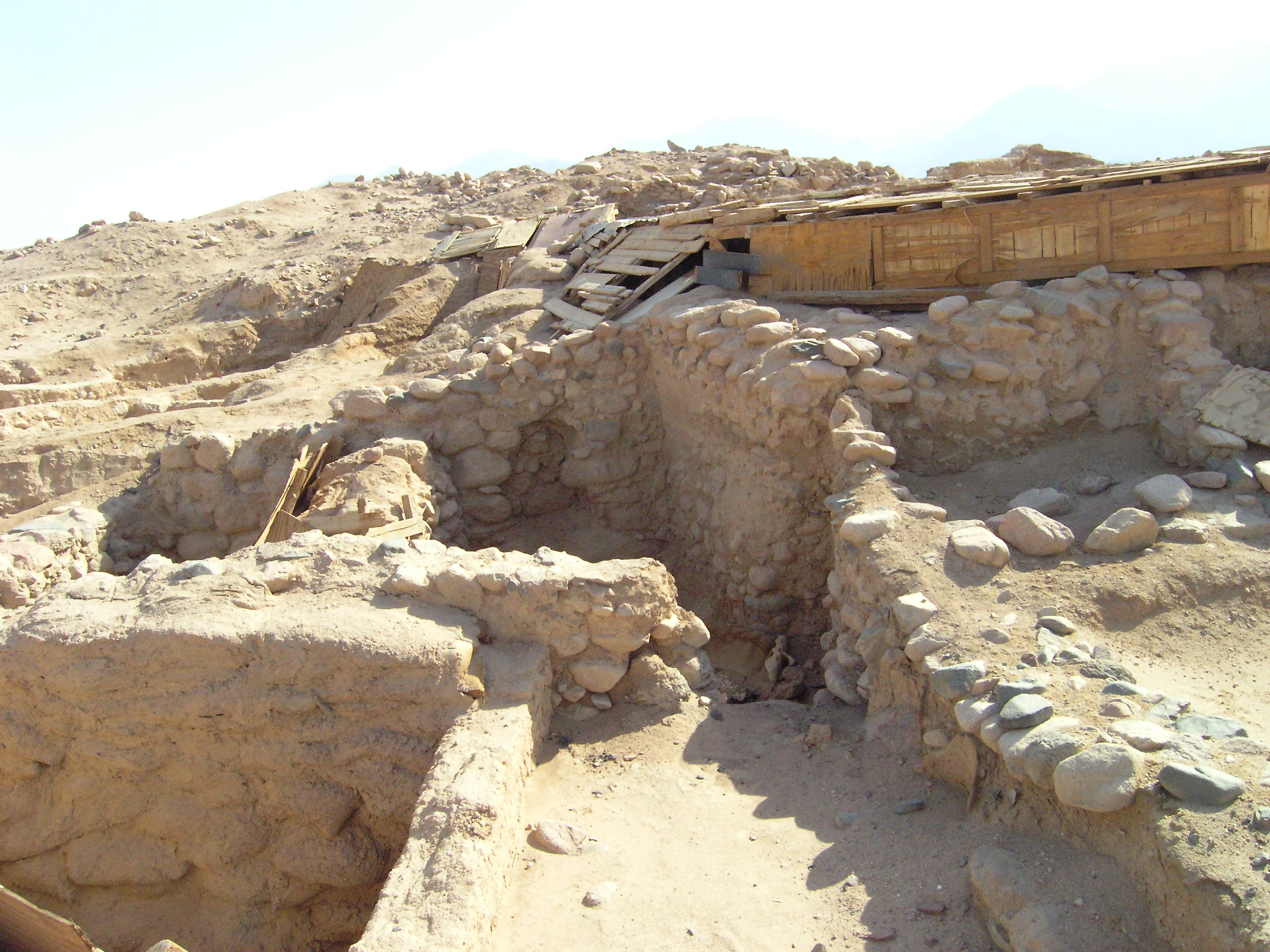 Westlicher Teil der Ausgrabungen auf dem Tall Hujayrat al-Ghuzlan, Jordanien; Lehmziegelwände teilweise abgedeckt.